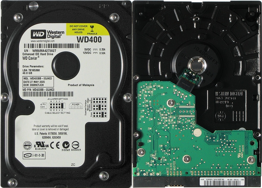 Beschreibung: handelsübliche Festplatte 3,5" / hard disk / Western Digital WD400 / 40 GB / 7200 U/min produced May 2005 Fotograf: Darkone, 22. Juli 2005